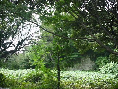 鎌倉市 東勝寺の旧寺城